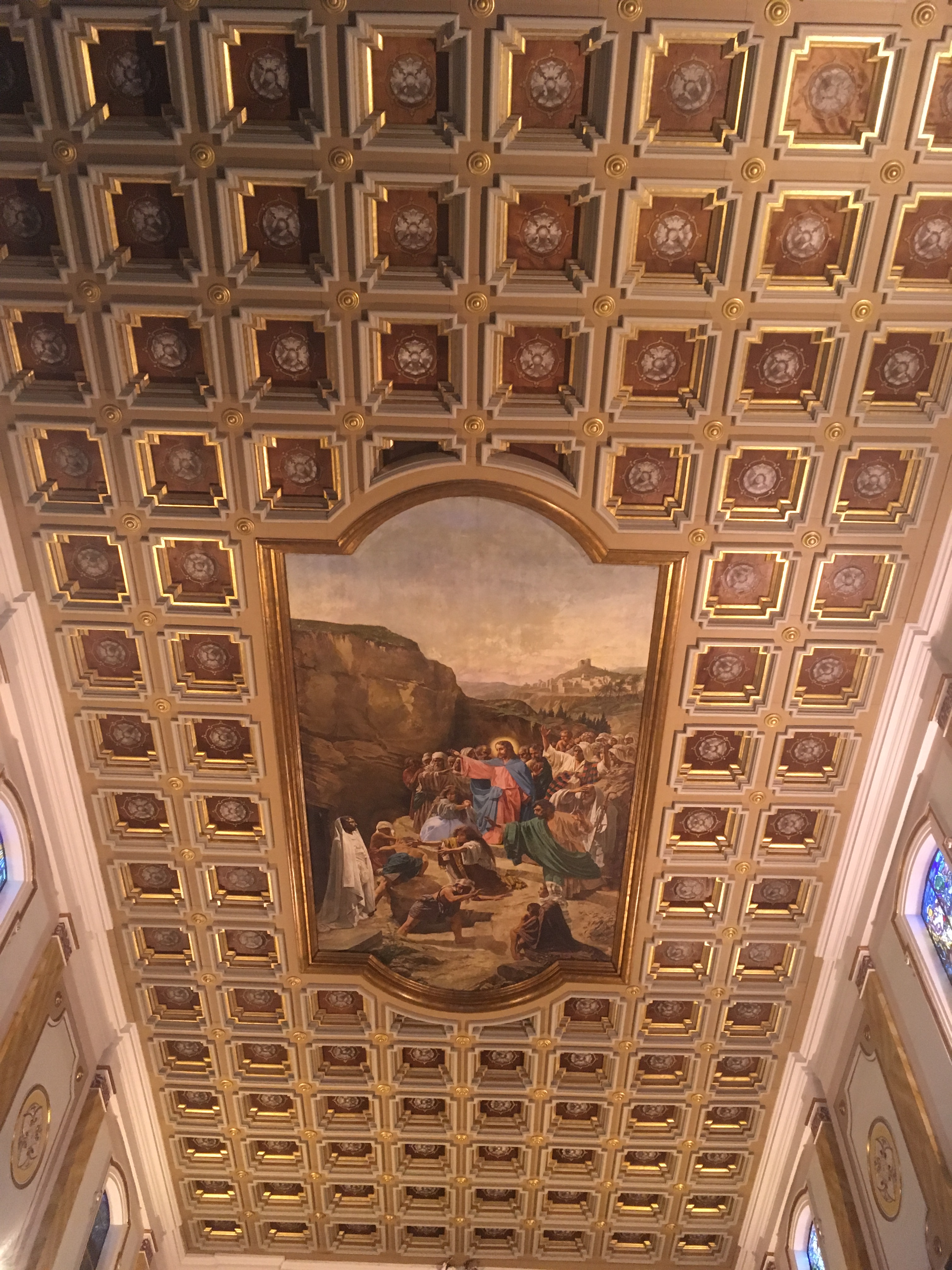 soffitto a Cassettoni in legno